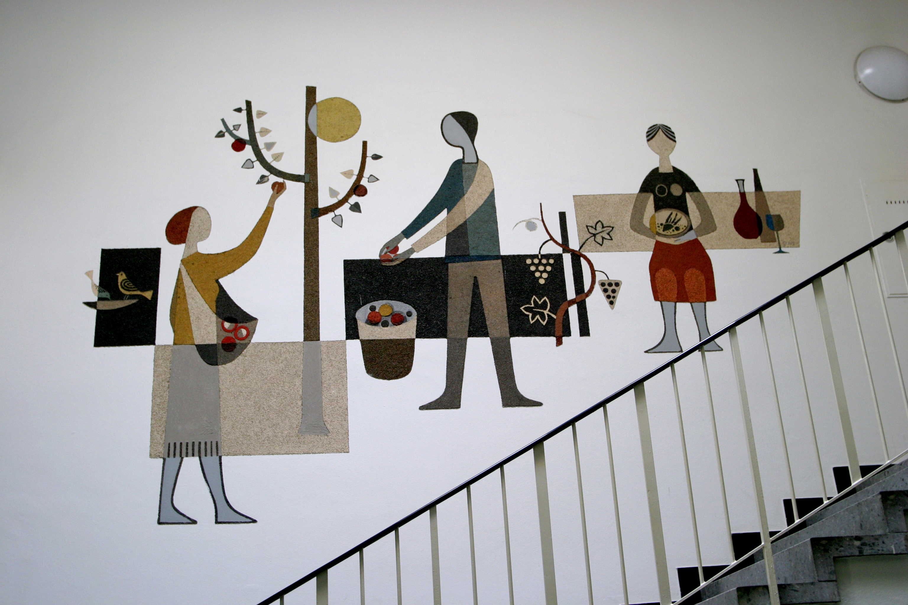 Die Kratzputzarbeit im westlichen Treppenaufgang des Seitengebäudes der Deutschen Rentenversicherung Rheinland-Pfalz in Speyer. Foto: Walter Hoinka